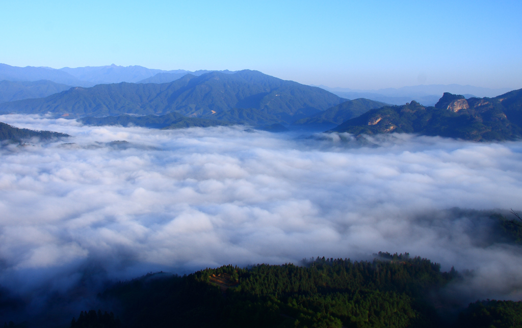 武夷山云海